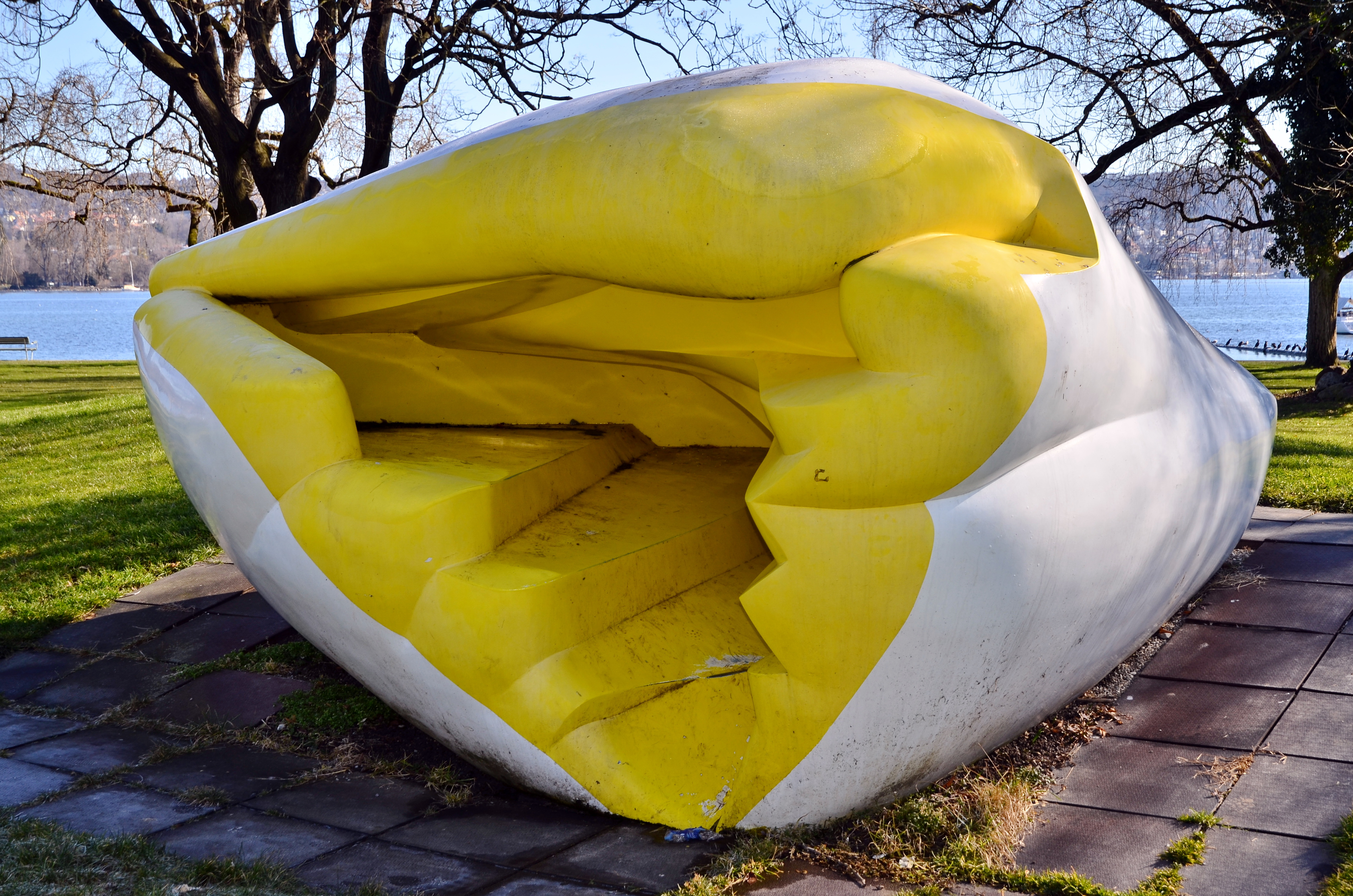 Strandbad Mythenquai in Zürich-Wollishofen (Switzerland)